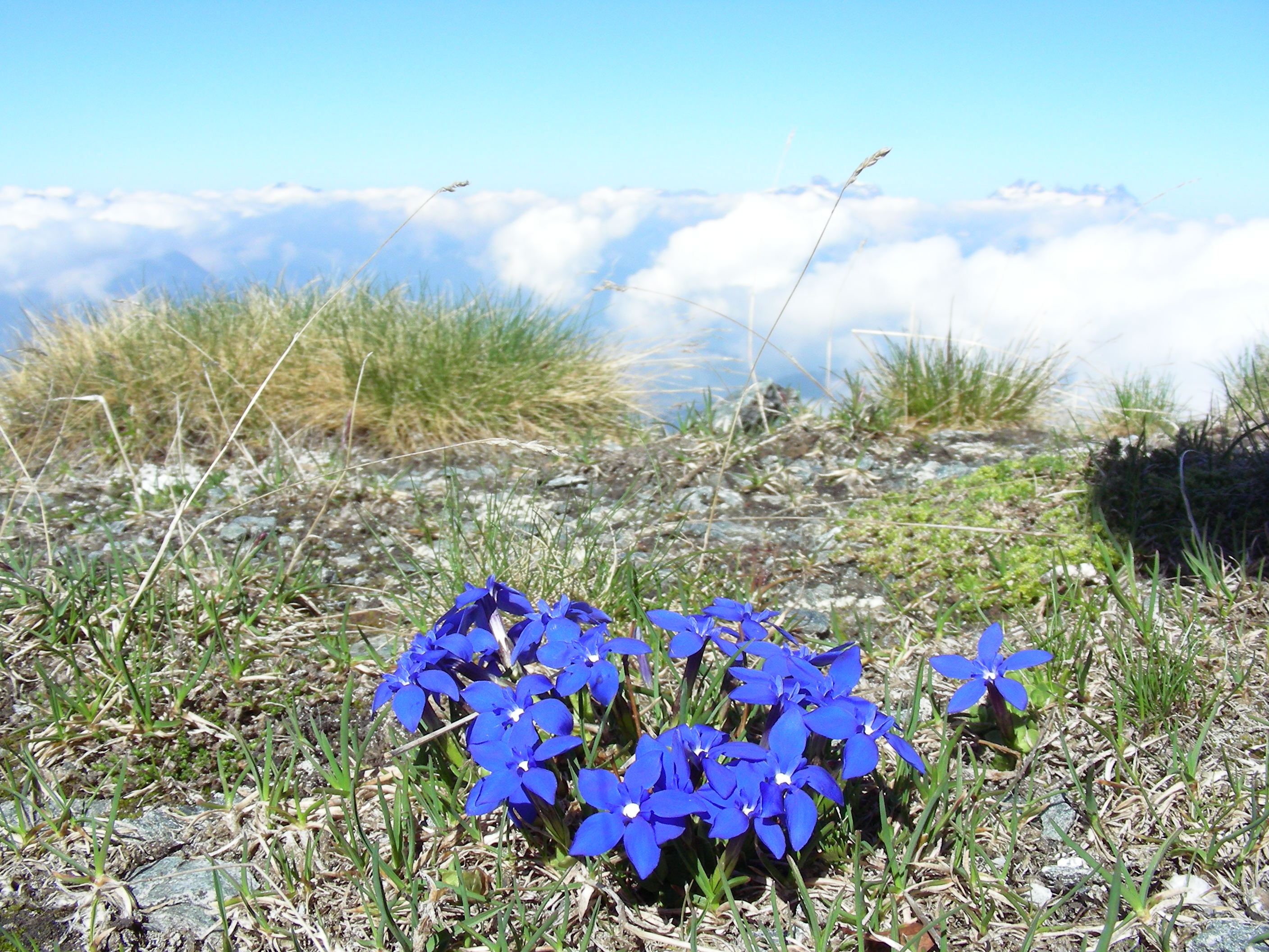 Enziane